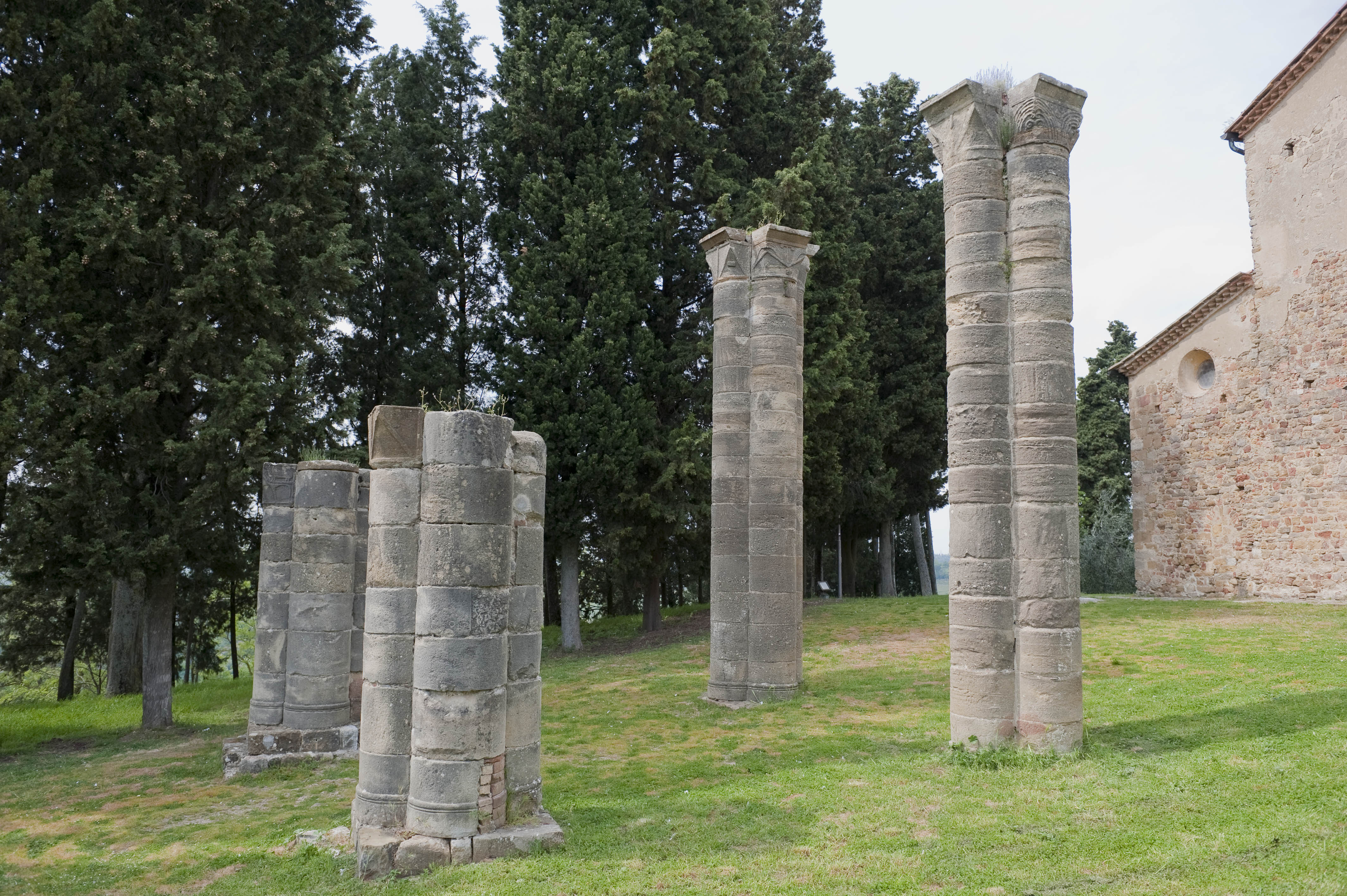 Colonne dell'antico battistero della pieve di Sant'Appiano, Barberino Val d'Elsa